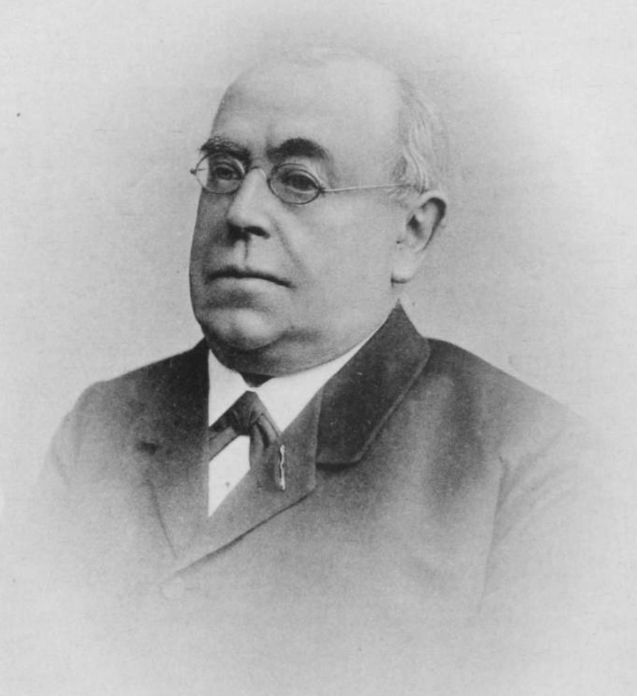 Hornjoserbsce: Korla Herman Robert Rjeda (1816–1900); farar a prěni serbski protykar.